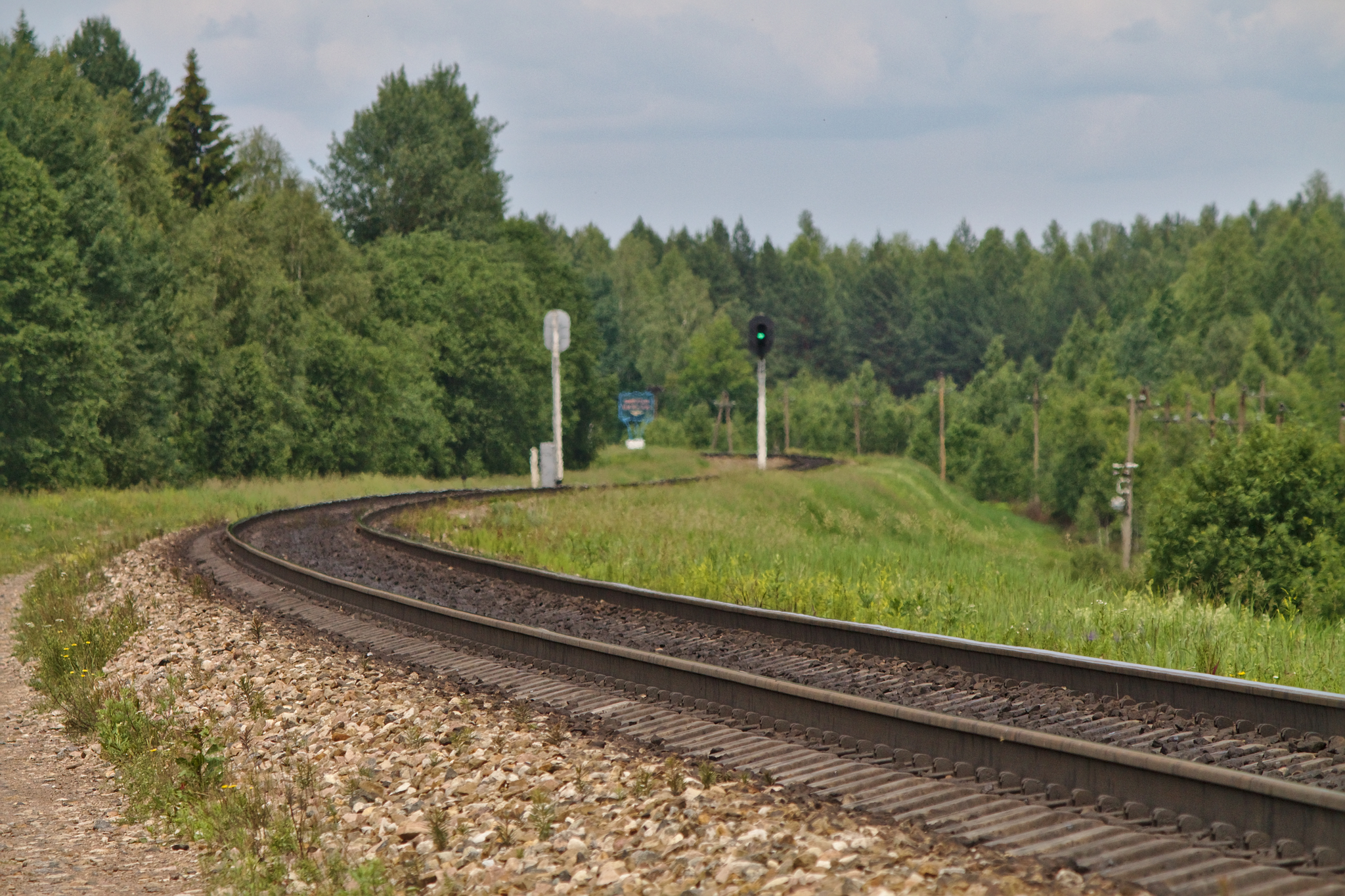 Рудня - Заольша. см. фото 601057 в альбоме автора